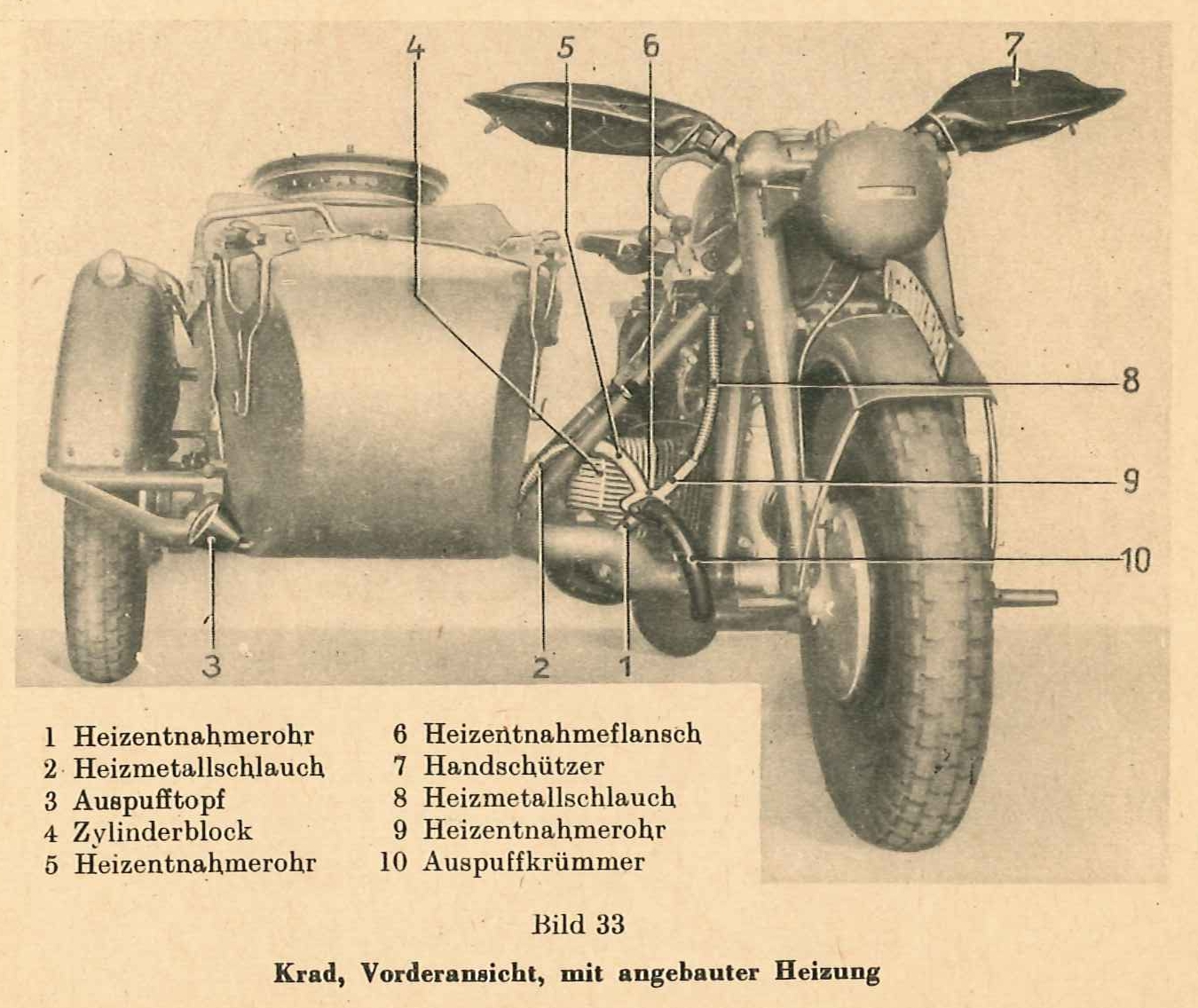 Krad mit eingebautem Heizgerät